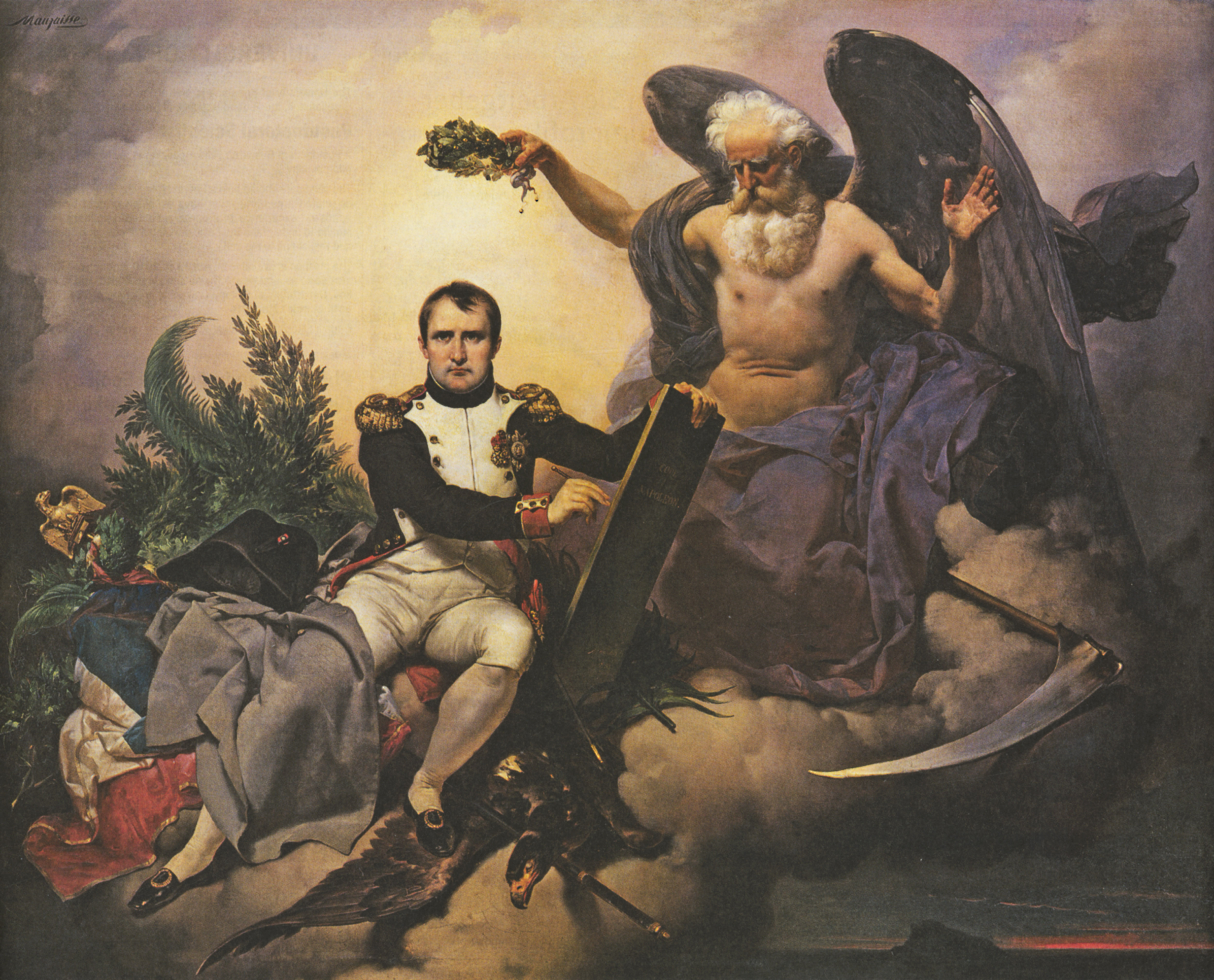 Napoleon als Gesetzesschöpfer